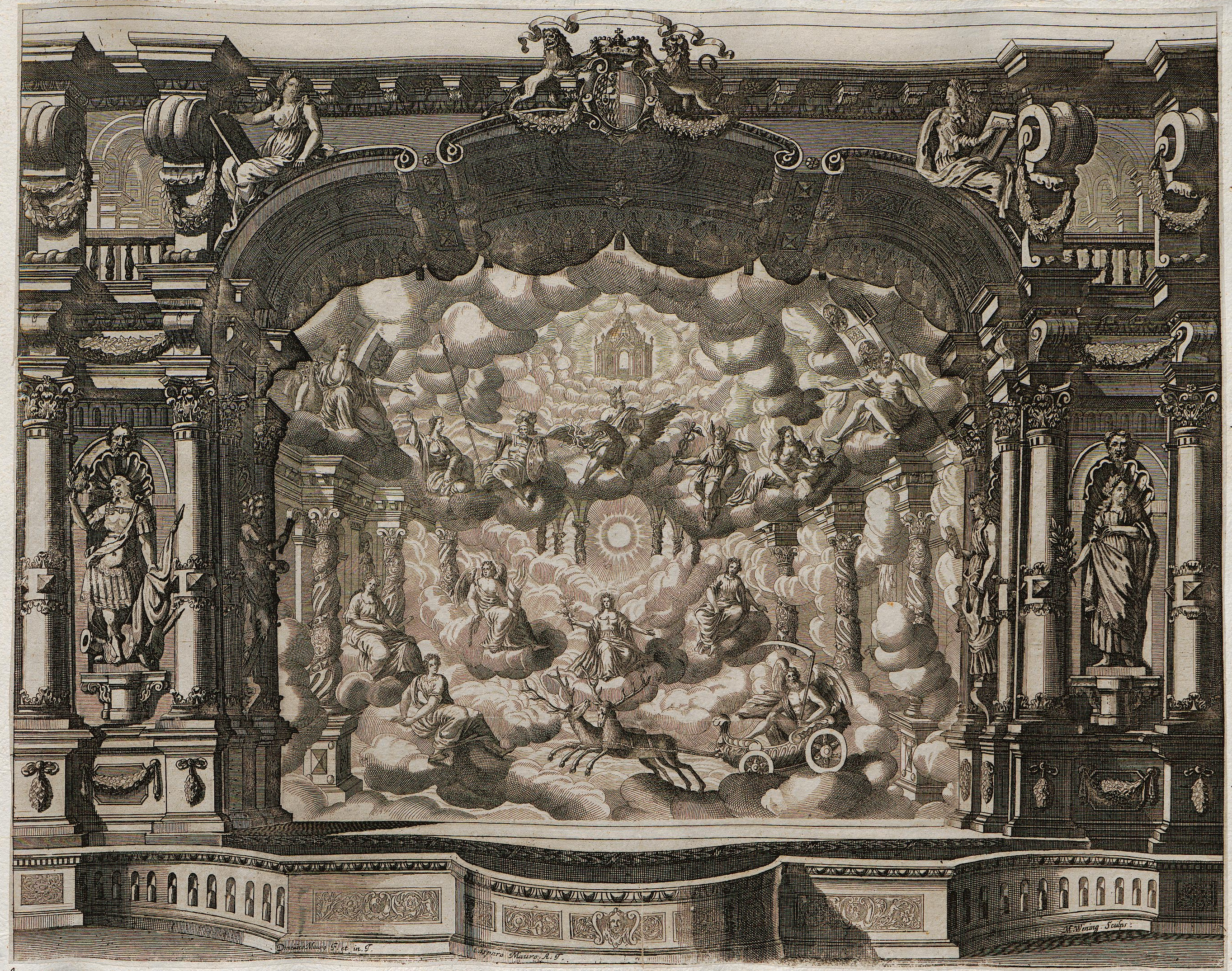 Grafik aus dem Klebeband Nr. 15 der Fürstlich Waldeckschen Hofbibliothek Arolsen Bühnenbild zur Oper Servio Tullio von Agostino Steffani (Musik) und Ventura Terzago (Text). Uraufgeführt im Januar 1686 im Opernhaus am Salvatorplatz München. II. Bild: Der Himmel, auf Wolken sitzend die Götter (Jupiter, Juno, Neptun, Venus, Merkur, Mars, Diana, Vesta, Vulcan, Ceres, Pallas, Phoebus), Chronos im Wagen von zwei Hirschen gezogen